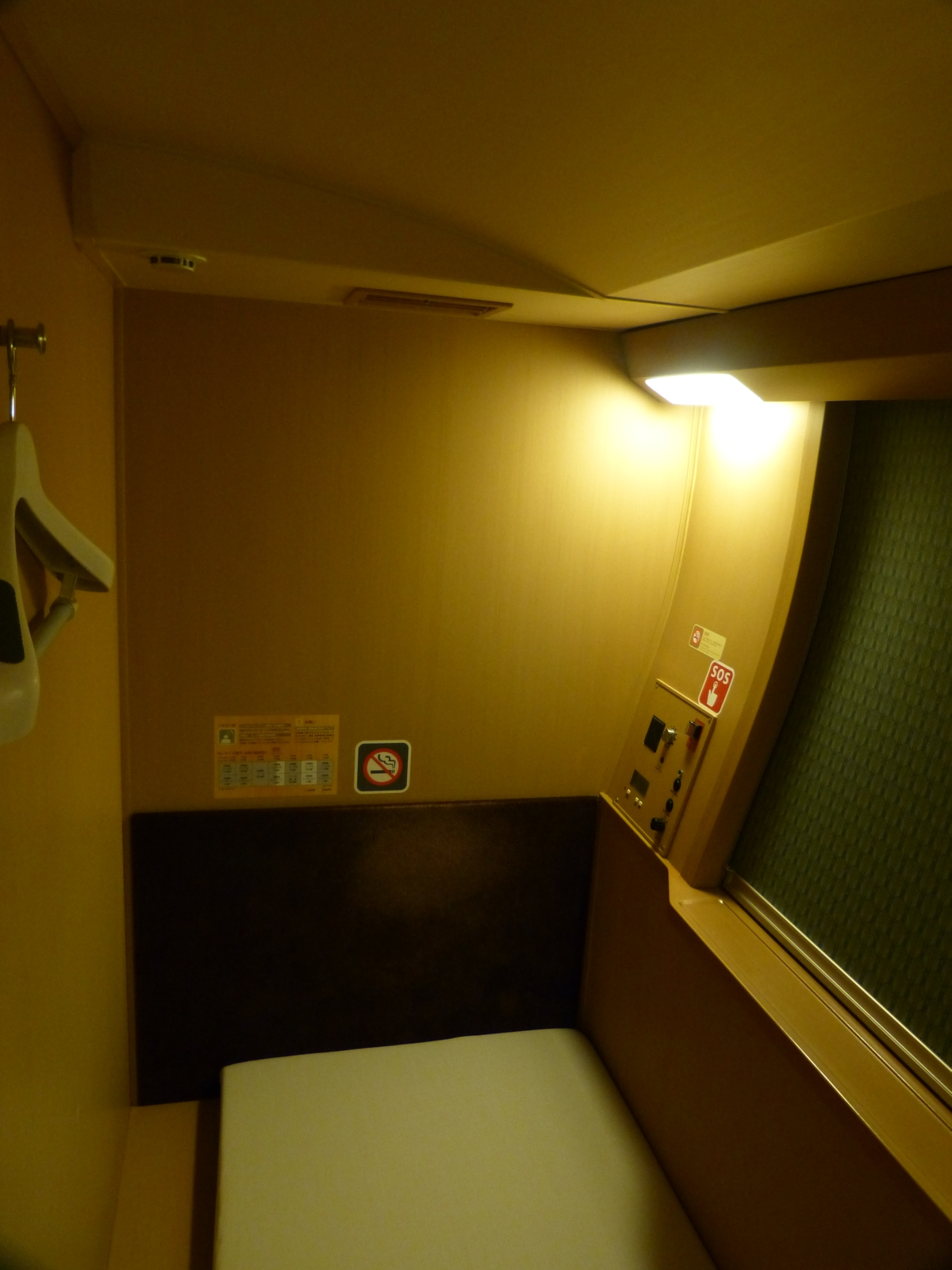 JR西日本285系電車。クハネ285-3(I2編成) 2階シングル。